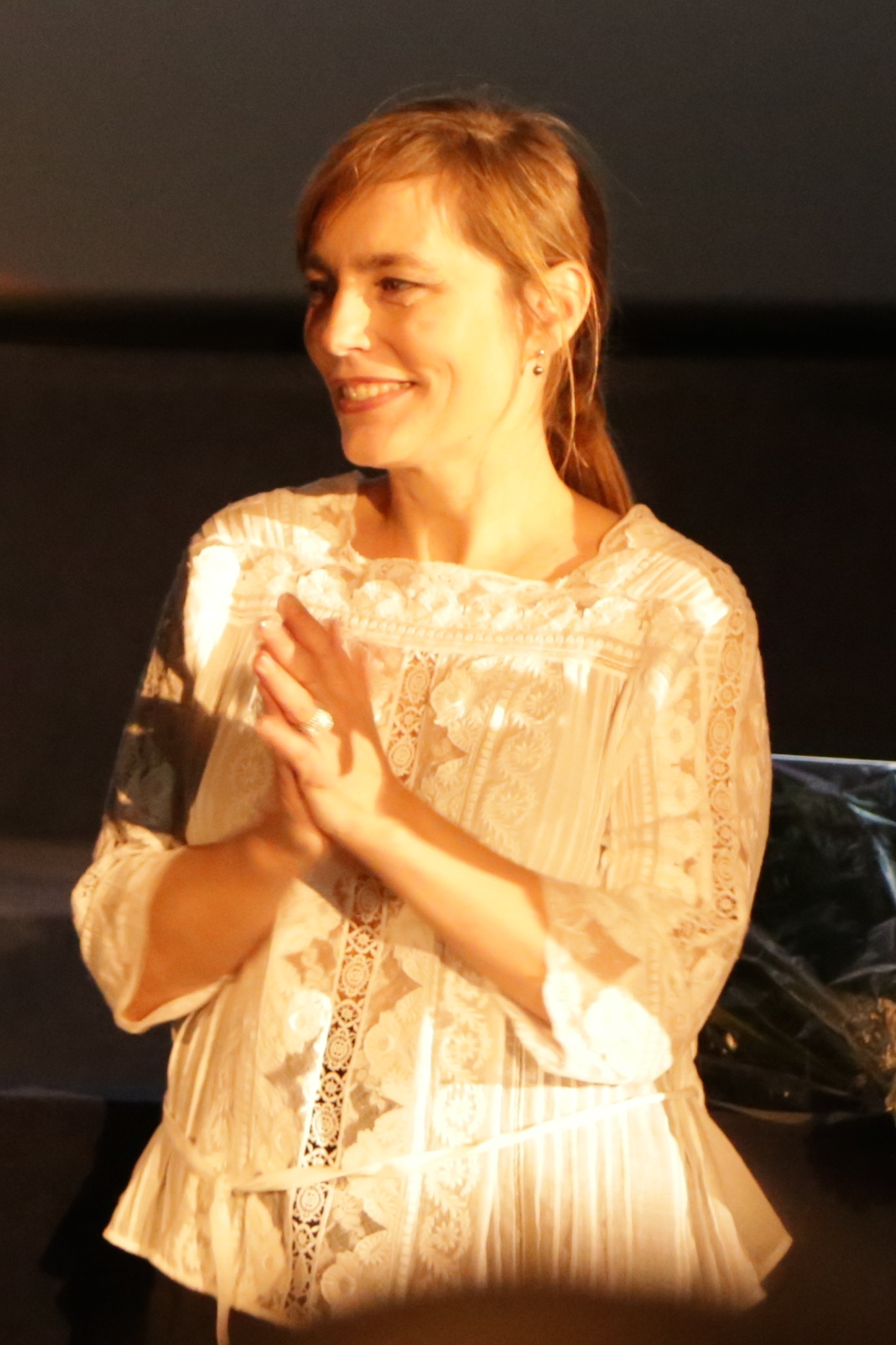 lors de l'avant 1er du film Barbecue